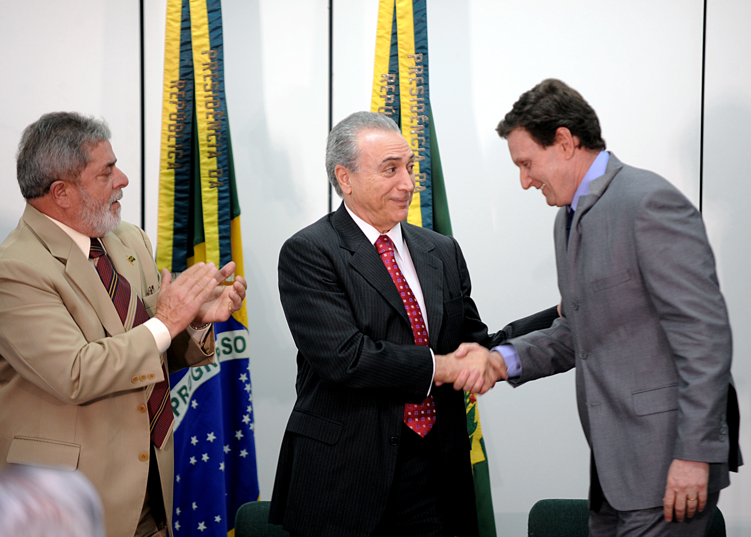 O presidente Lula, o presidente da Câmara, Michel Temer, e o senador Marcelo Crivella durante cerimônia de sanção do projeto de lei que institui o Dia Nacional da Marcha para Jesus.